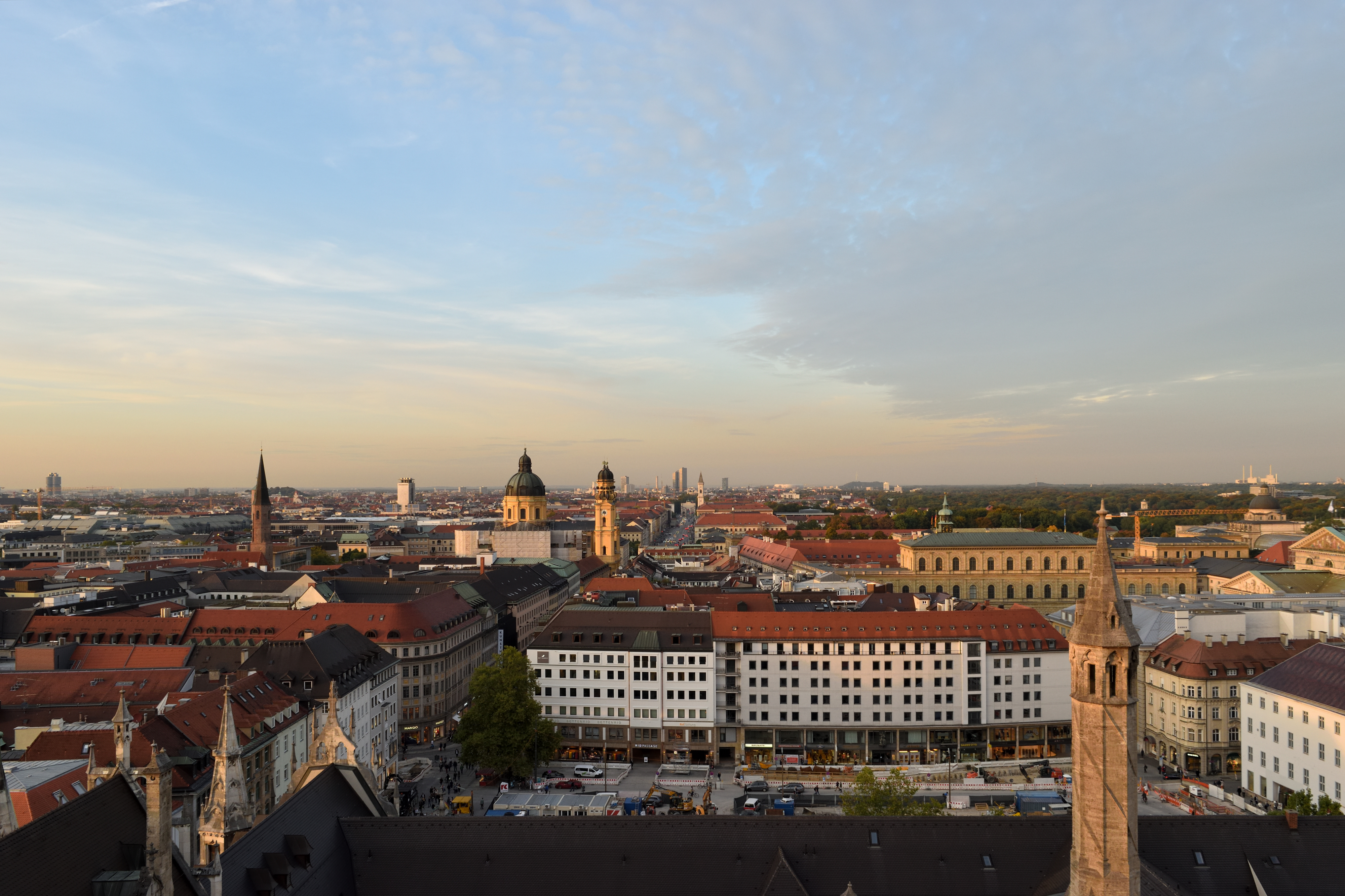 München - Blick vom Neuen Rathausturm nach Norden. Zu sehen sind u.a. Marienhof (vorne), Theatinerkirche (links), Residenz (rechts) und Englischer Garten (hinten rechts) - September 2017This is a photograph of an architectural monument.